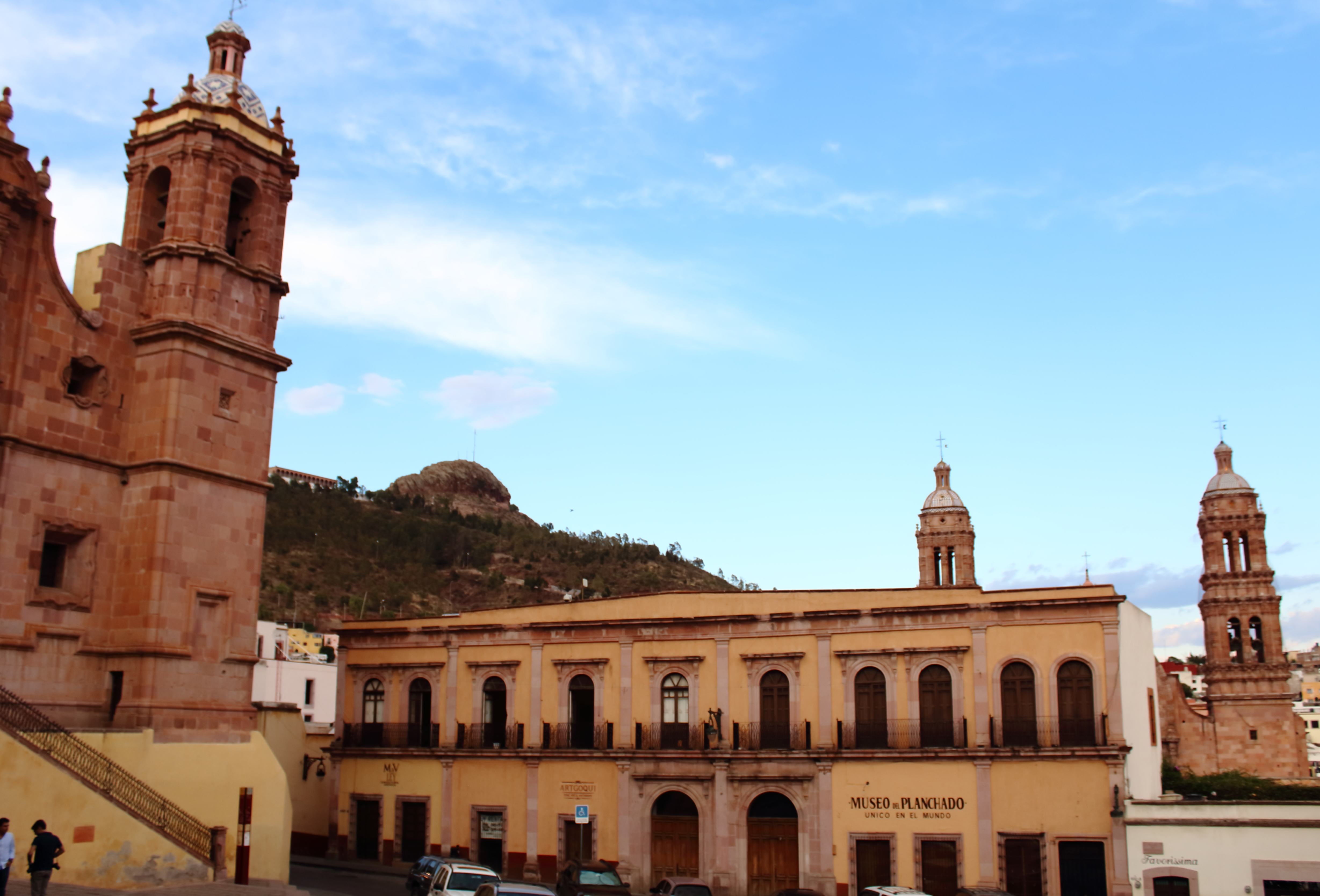 Vista de a Parroquia de Santo Domingo en Zacatecas, el Museo del Planchado y el Cerro de la Bufa.